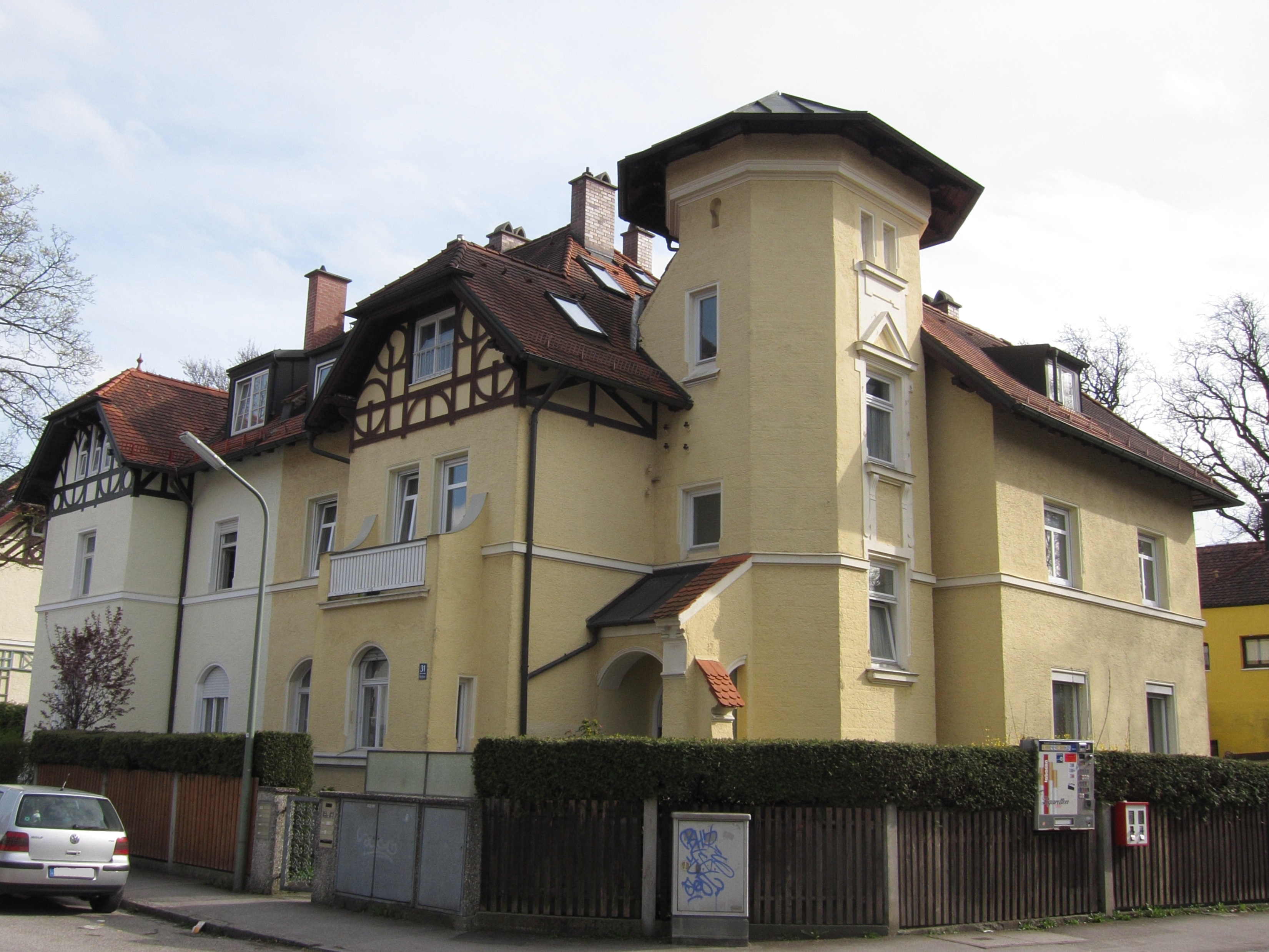 Dachstraße 29/31; Doppelhaus mit Fachwerk, 1899–1900 von Anton Thunig und Andreas Pabst.